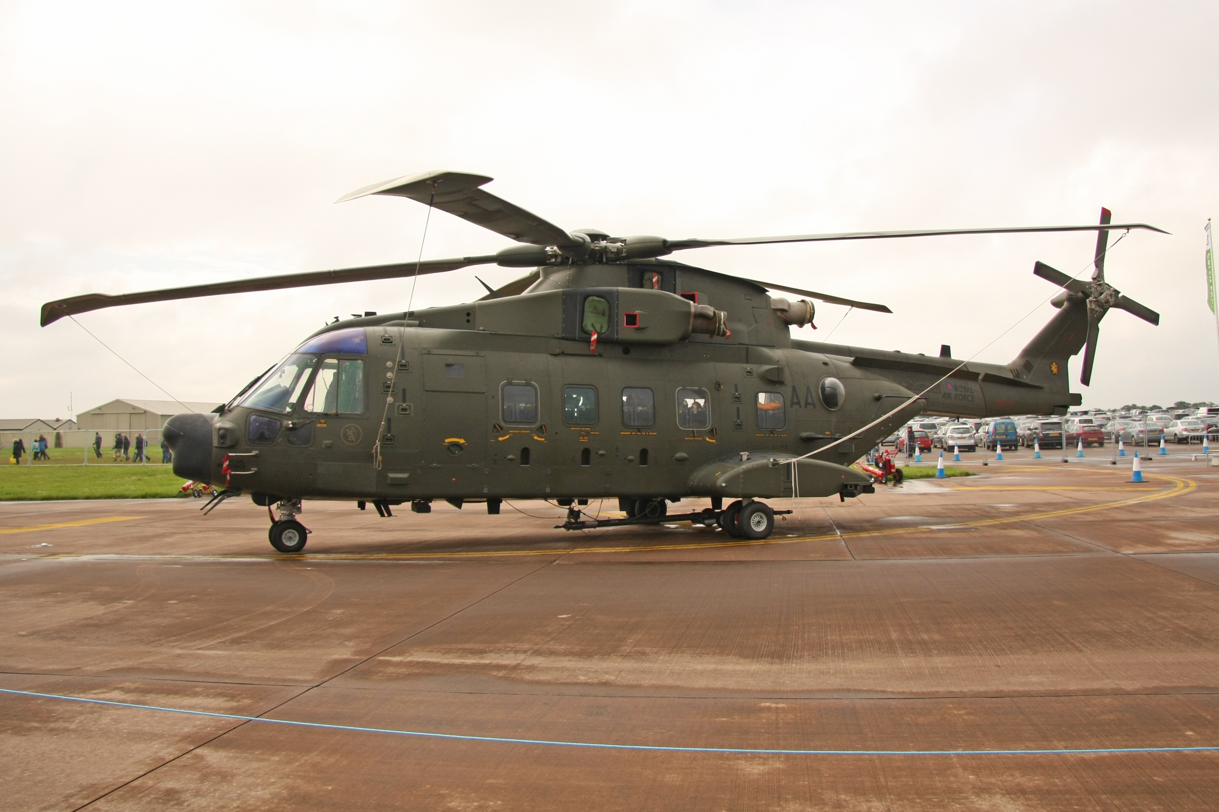 Westland Merlin HC3